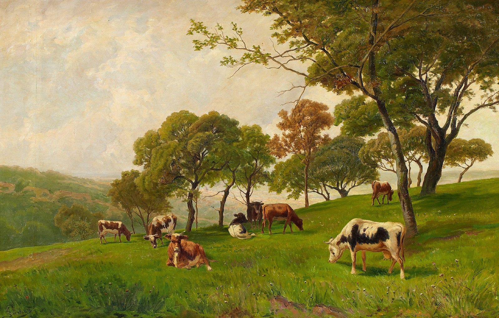 Kuhweide. Signiert P.Bücken. Öl auf Leinwand. 71 x 110 cm